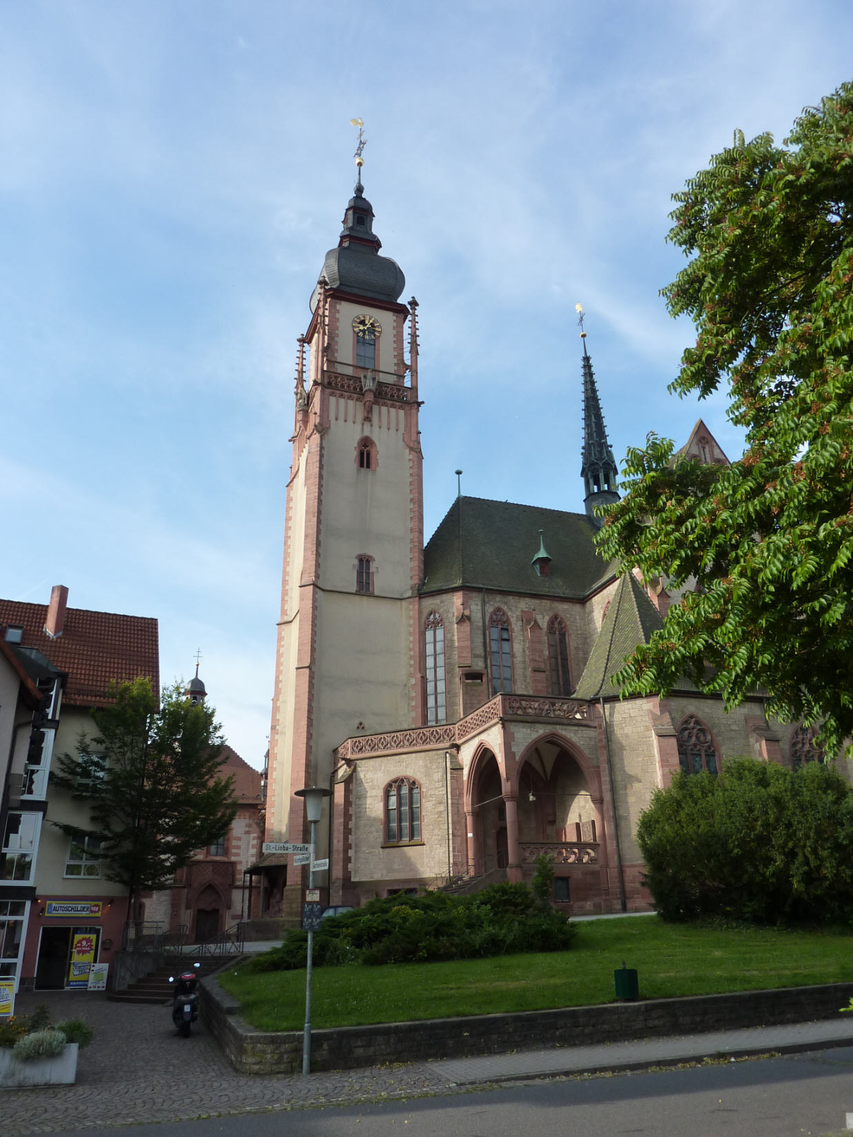 Stadtkirche St. Martin in Tauberbischofsheim